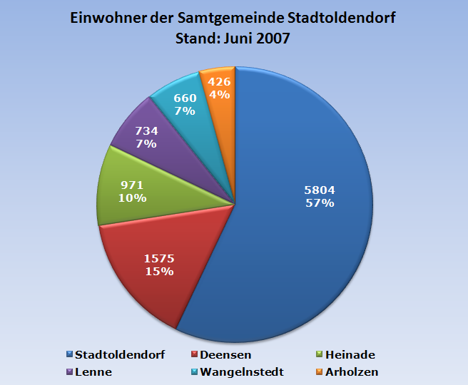 Bevölkerungstatistik: Einwohnerstand der Mitgliedsgemeinden der Samtgemeinde Stadtoldendorf (Landkreis Holzminden) zum 30. Juni 2007 nach Datenstand des Niedersächsischen Landesamtes für Statistik (NLS)